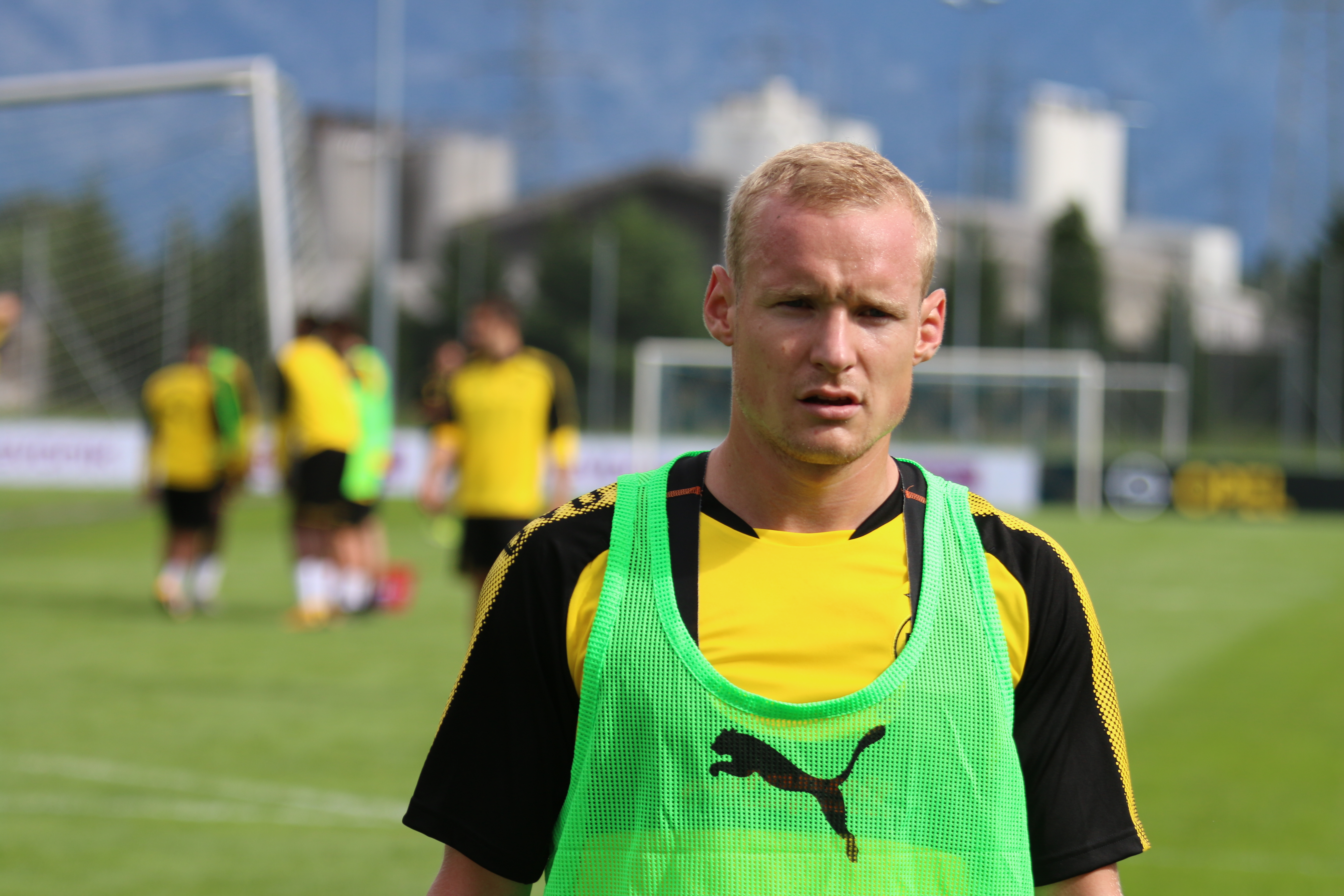 Sebastian Rode im Trainingslager in Bad Ragaz am 27.07.2017